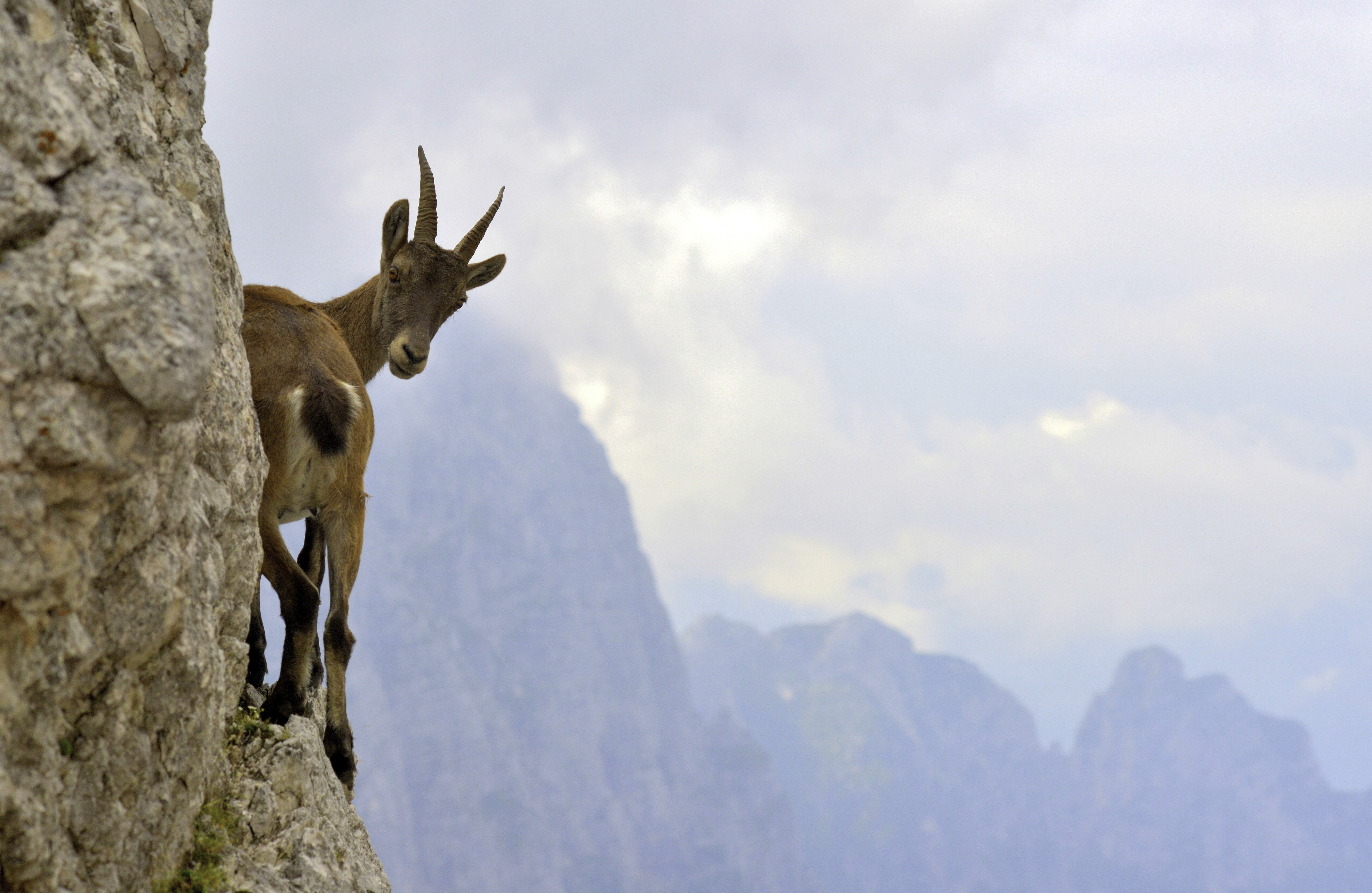 Stambecco solitario presso la forca dei Disteis